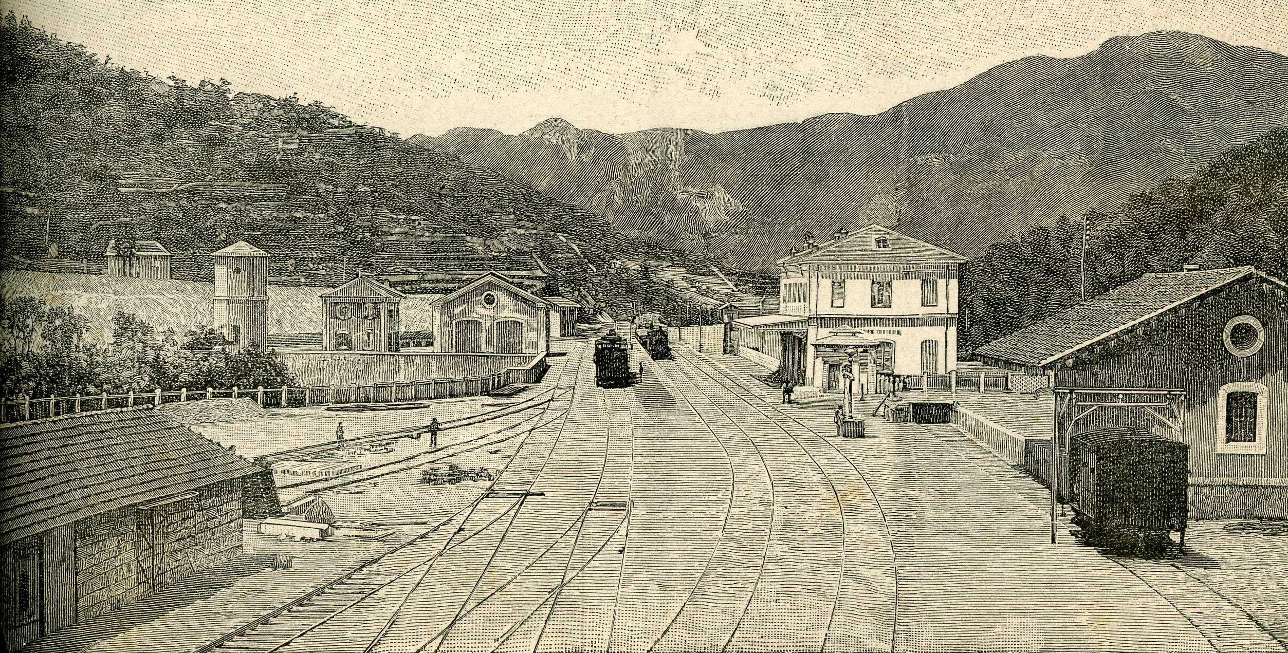 Nuova ferrovia Genova-Ovada-Asti: stazione di Campoligure (xilografia).